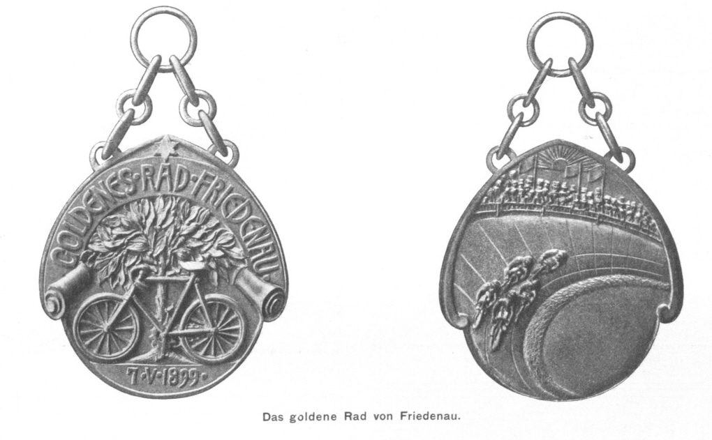 Medaille "Goldene Rad von Friedenau" aus dem Jahre 1899